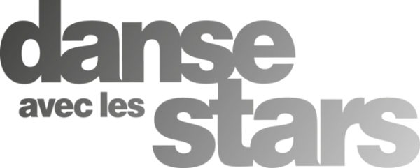 Logo de Danse Avec Les Stars à partir de la 4ème Saison sur TF1